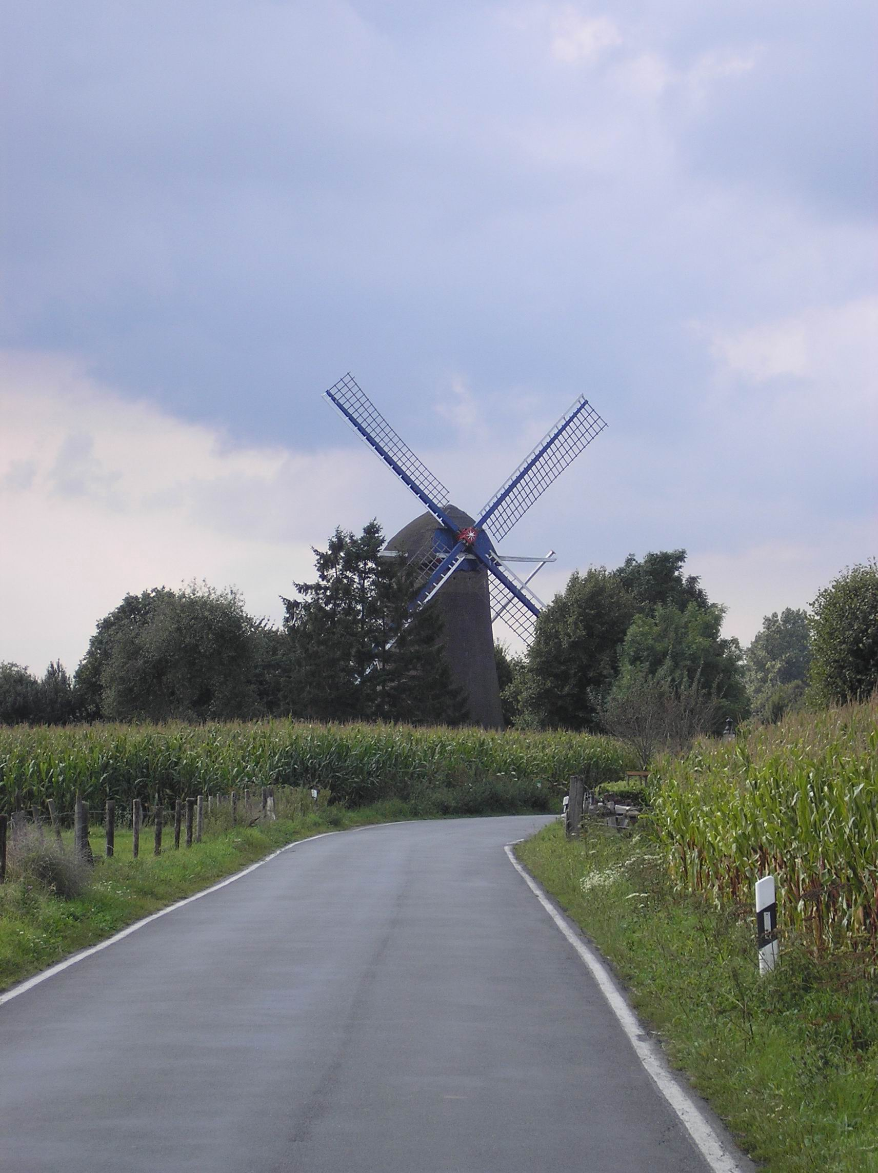 Windmühle in Mehr, Gemeinde Kranenburg